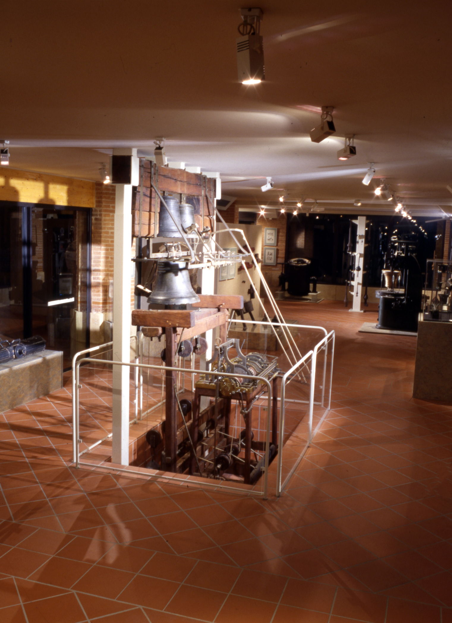 zone révolution et guerre du musée d'art campanaire